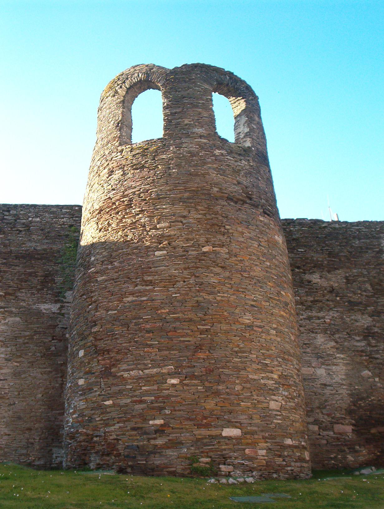 Muralla Romana de Lugo (España)